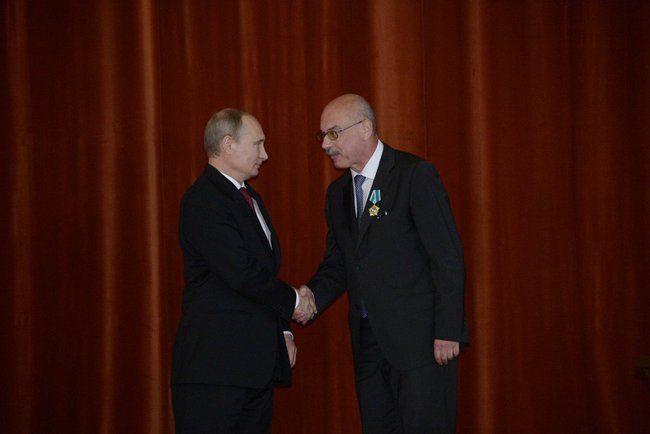 Постоянный представитель РФ при международных организациях в Вене Владимир Воронков награждён орденом Дружбы